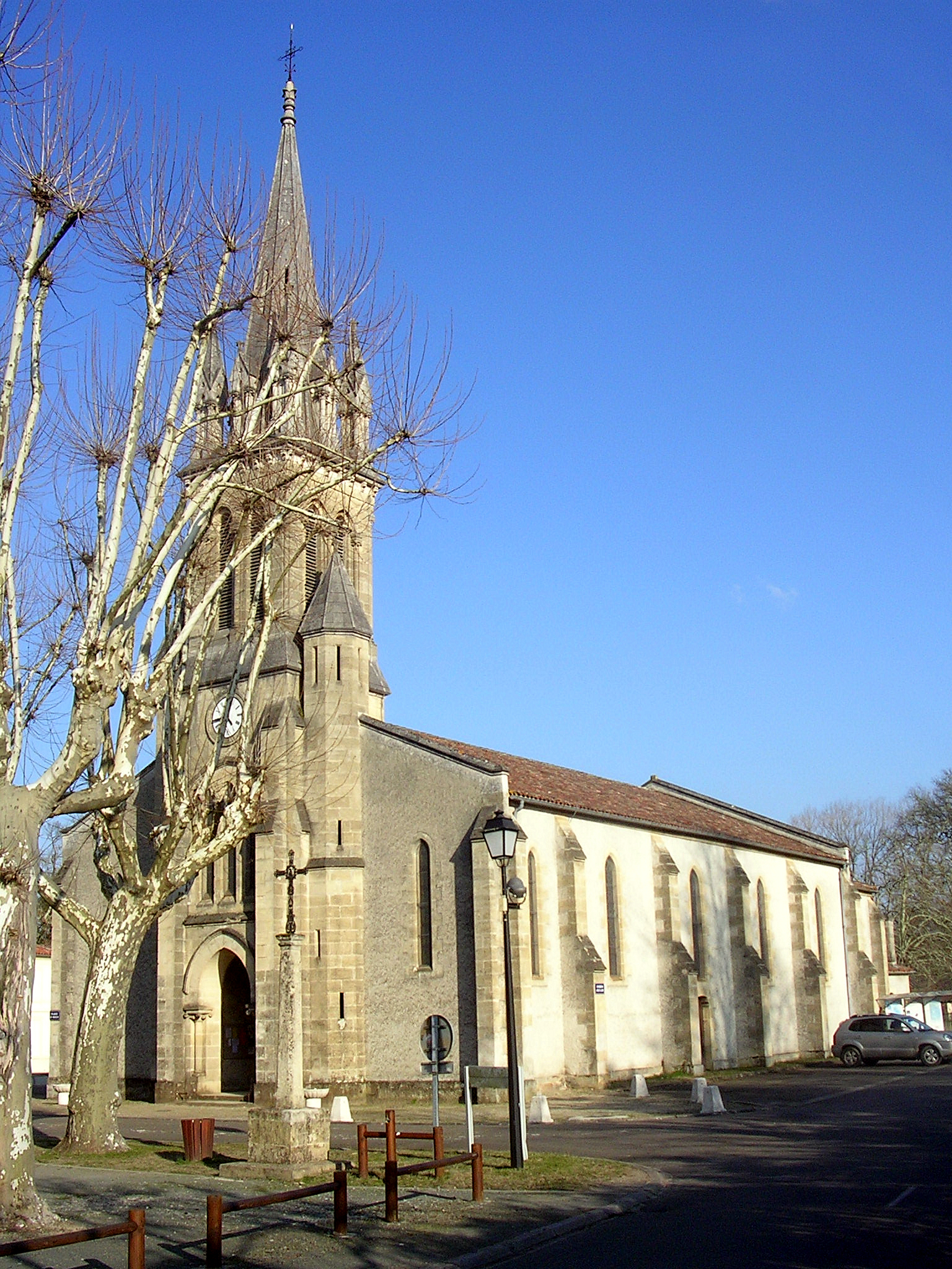 Église Saint-Jean-Baptiste de Luxey, dans le département français des Landes